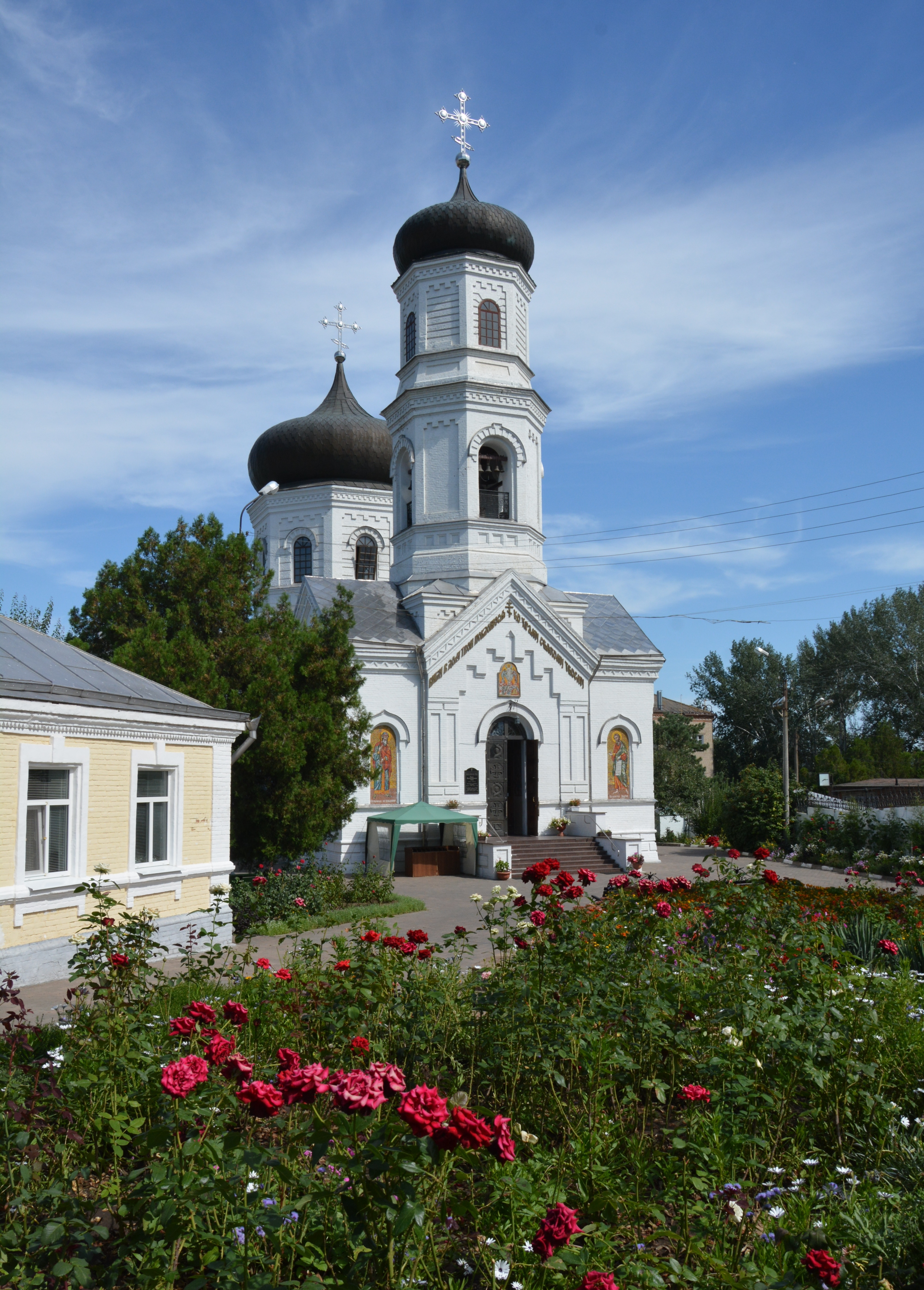 Спасопреображенська церква, Нікополь, вул. Карла Лібкнехта, 113-а